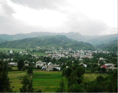 Березники (Свалявський район).